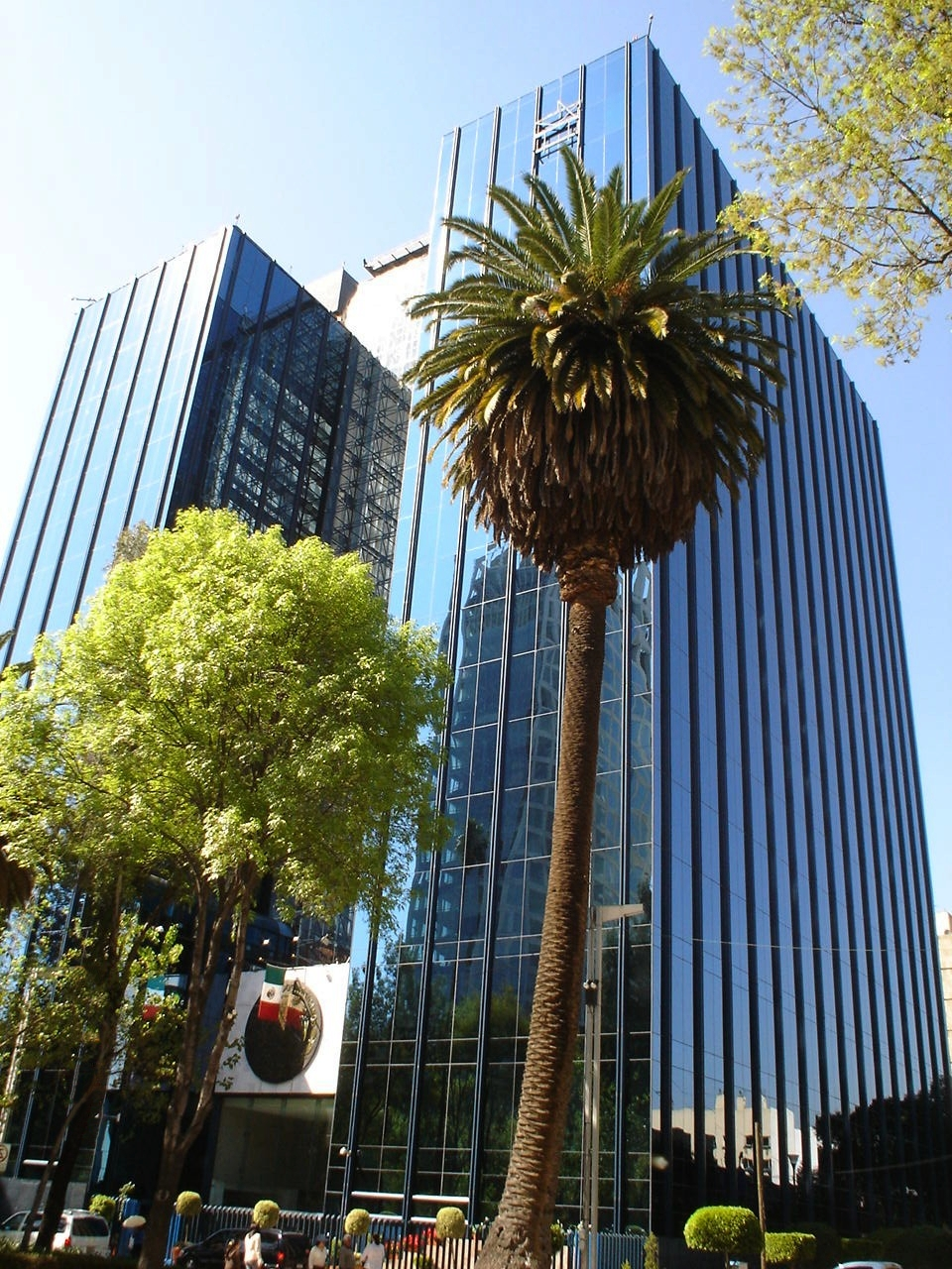 POLICIA FEDERAL MINISTERIAL 2009